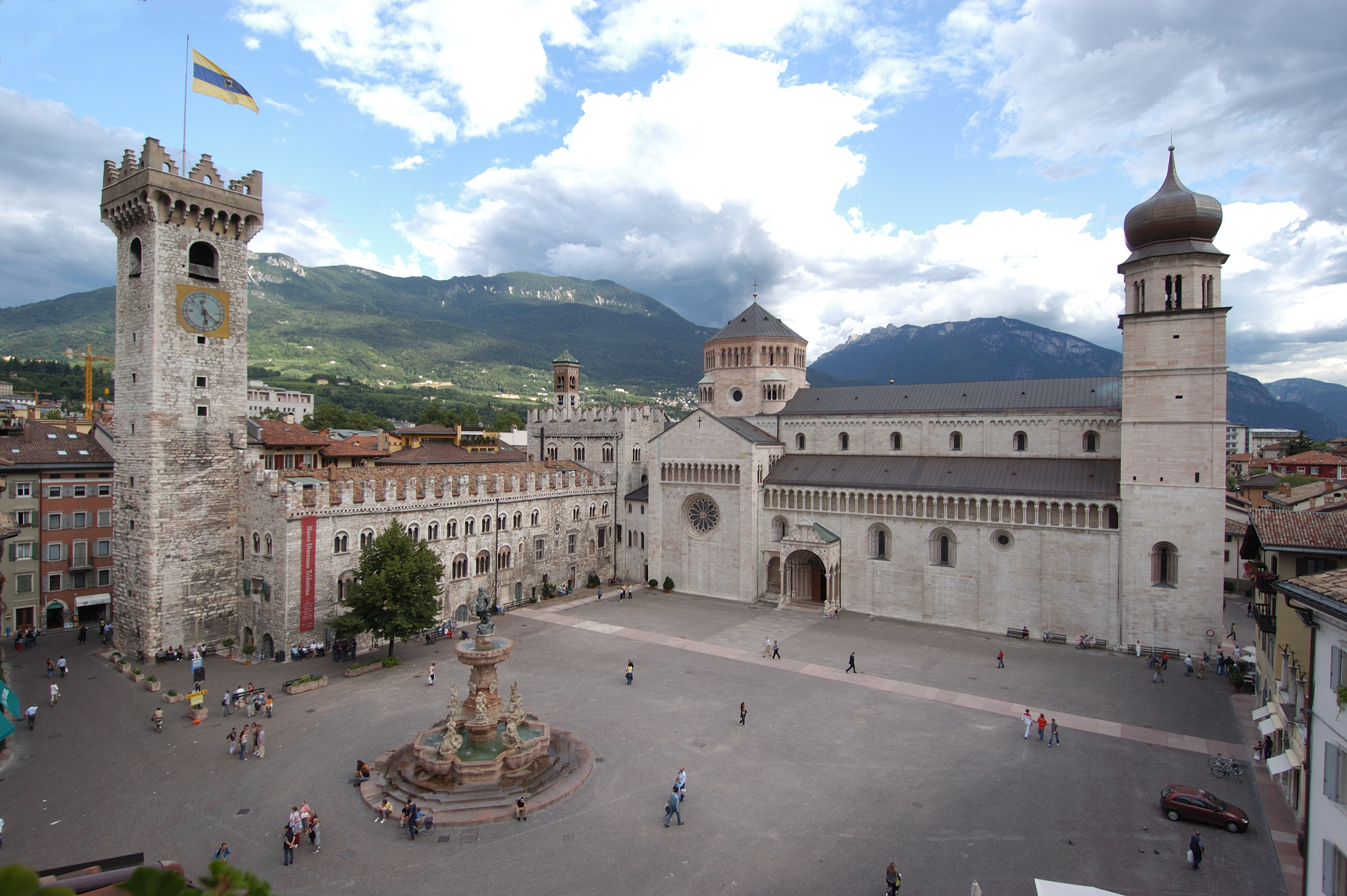 Veduta di Piazza Duomo a Trento, con il Palazzo pretorio e la Cattedrale di San Vigilio